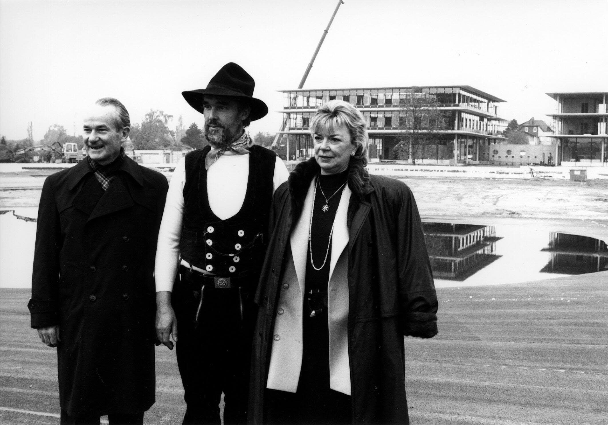 Liz (r.) und Reinhard Mohn (l.) auf dem Richtfest der Pavillons 1 und 2 der Bertelsmann Stiftung in Gütersloh